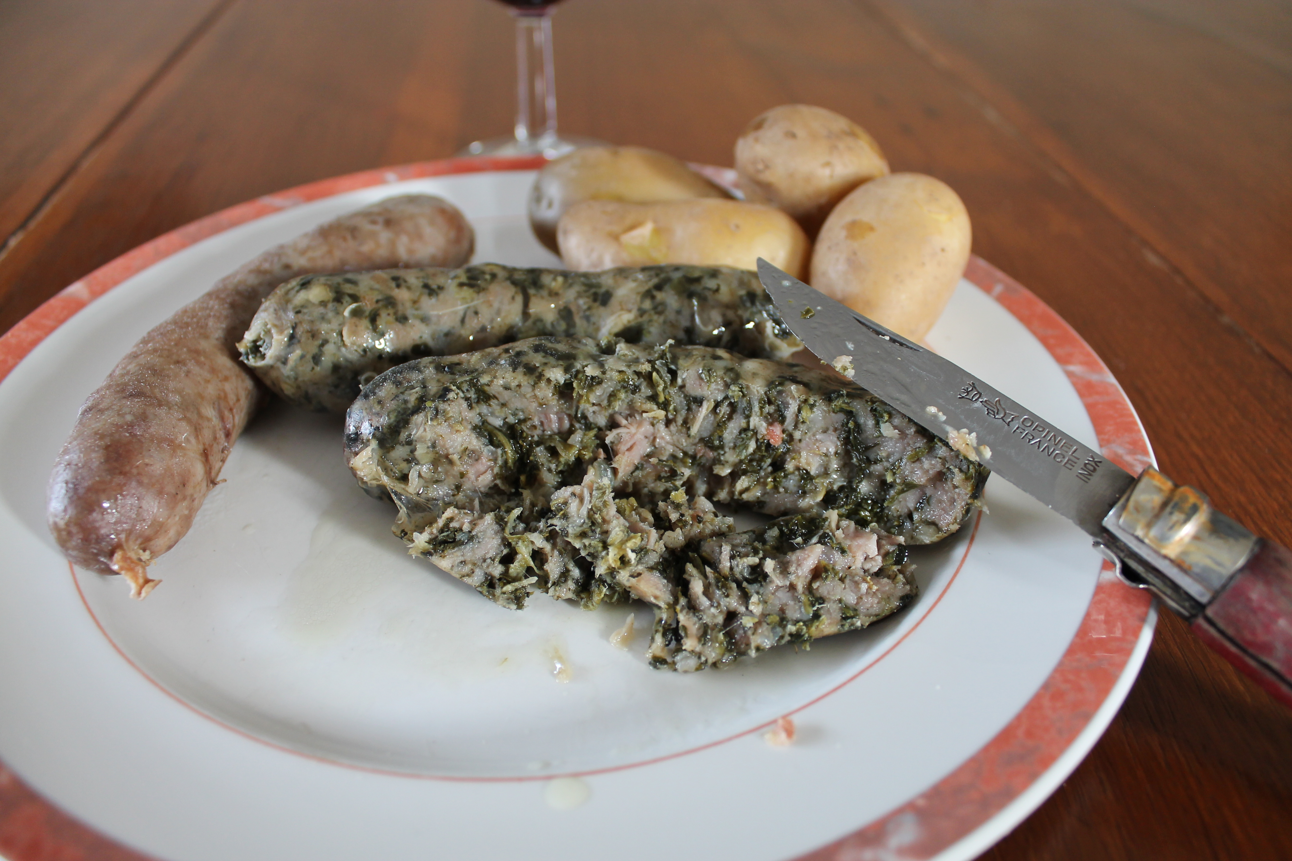 Plat de pormoniers, diots et pommes de terre